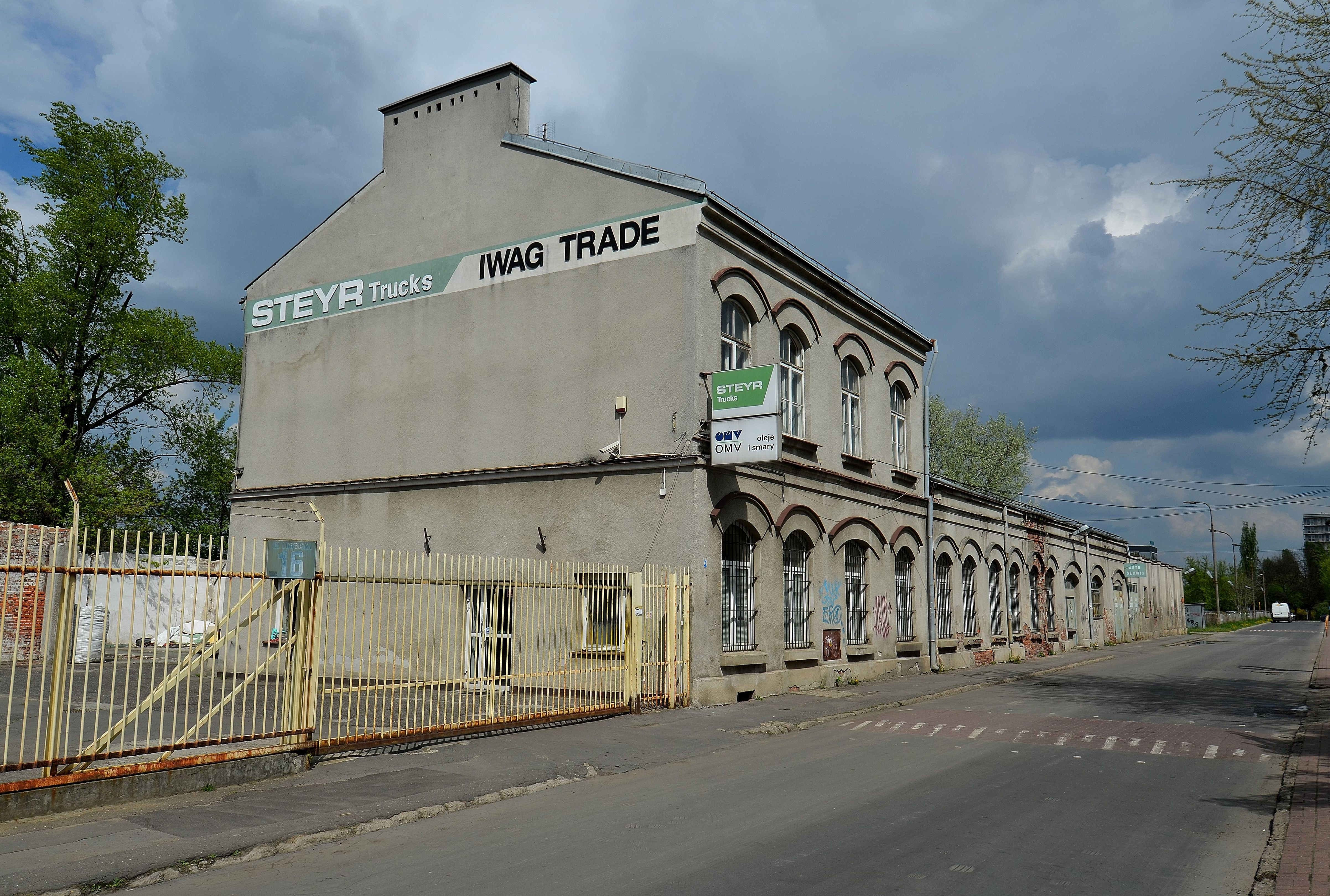 Dawna garbarnia Braci Lejzerowicz i S-ka przy ul. Lubelskiej 16